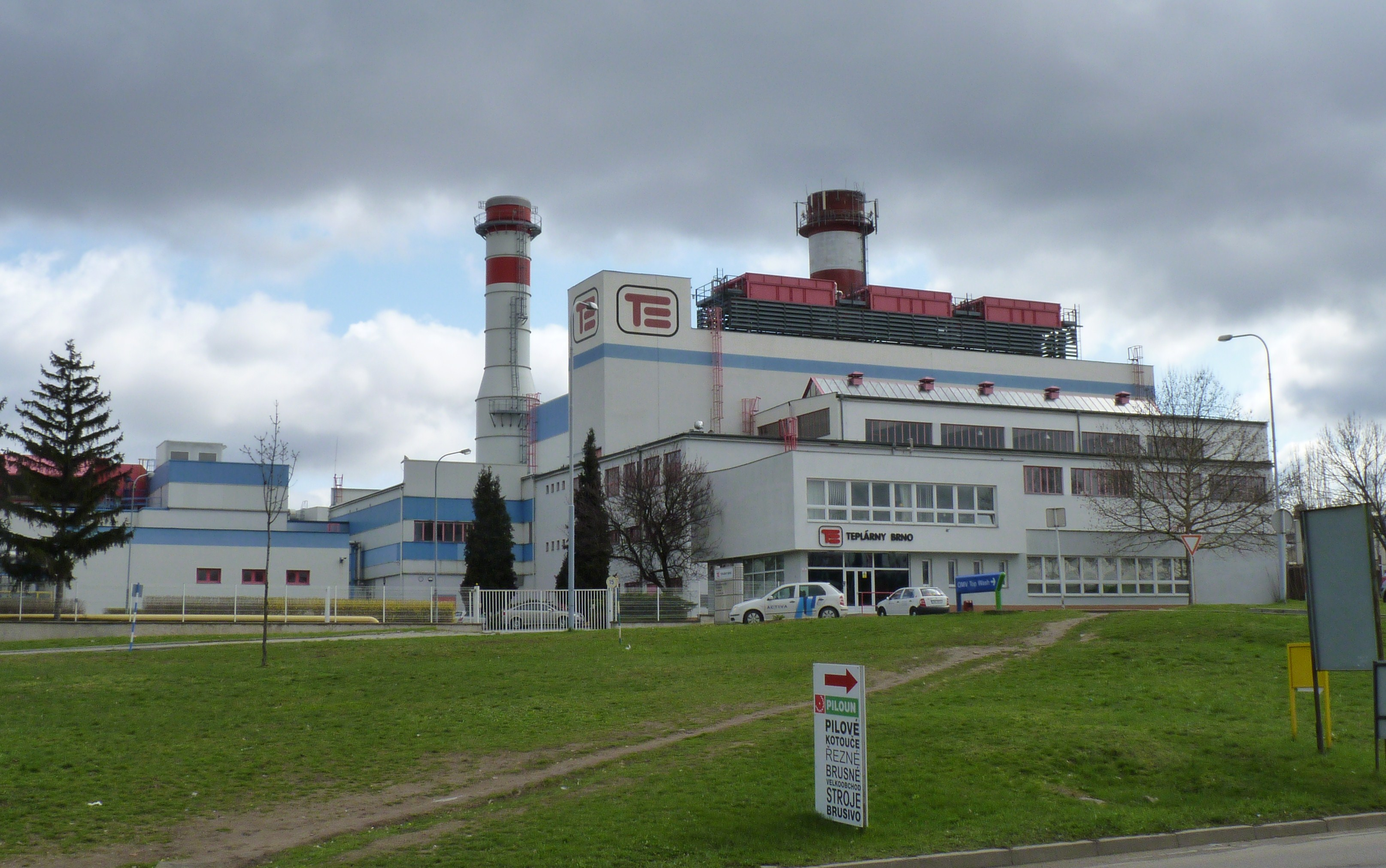 Teplárenský provoz Červený mlýn v Brně-Králově poli